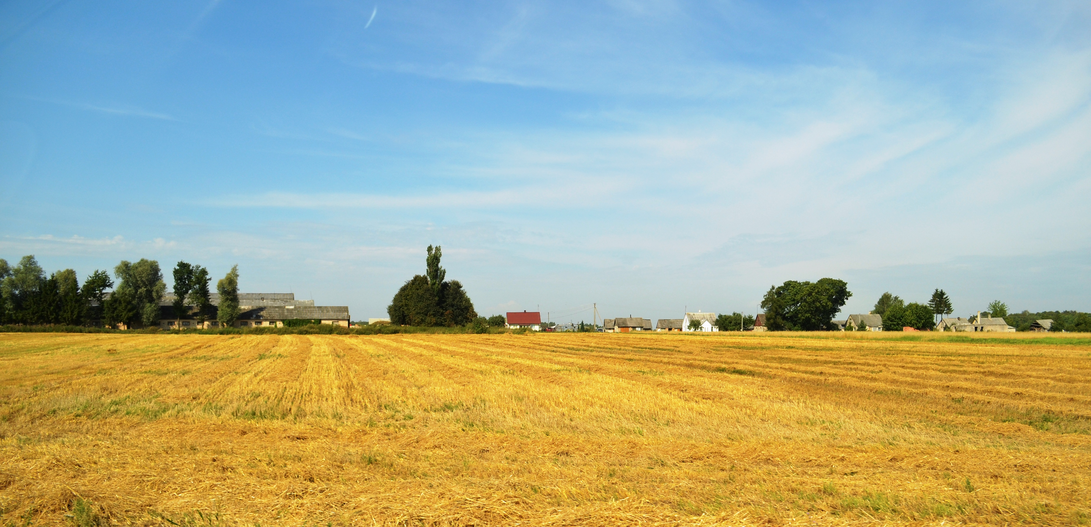 Butkiškiai, Panevėžio r.